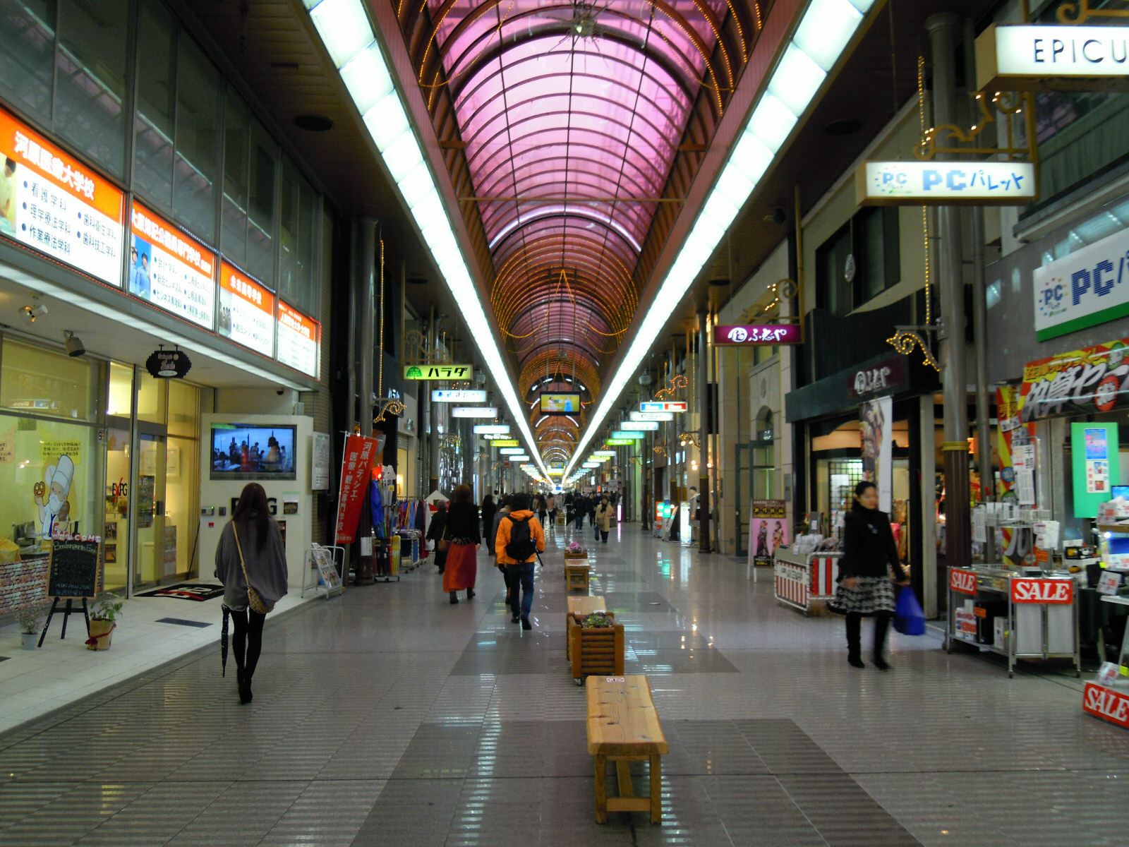 Gintengai